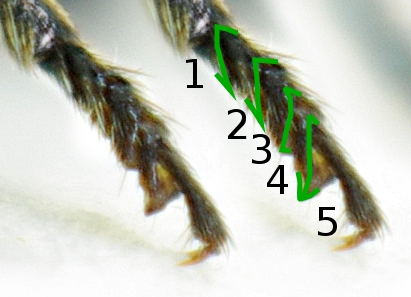 Tilloidea unifasciata, Vordertarsus 1....5 Tarsenglieder, Ränder rechts grün eingezeichnet